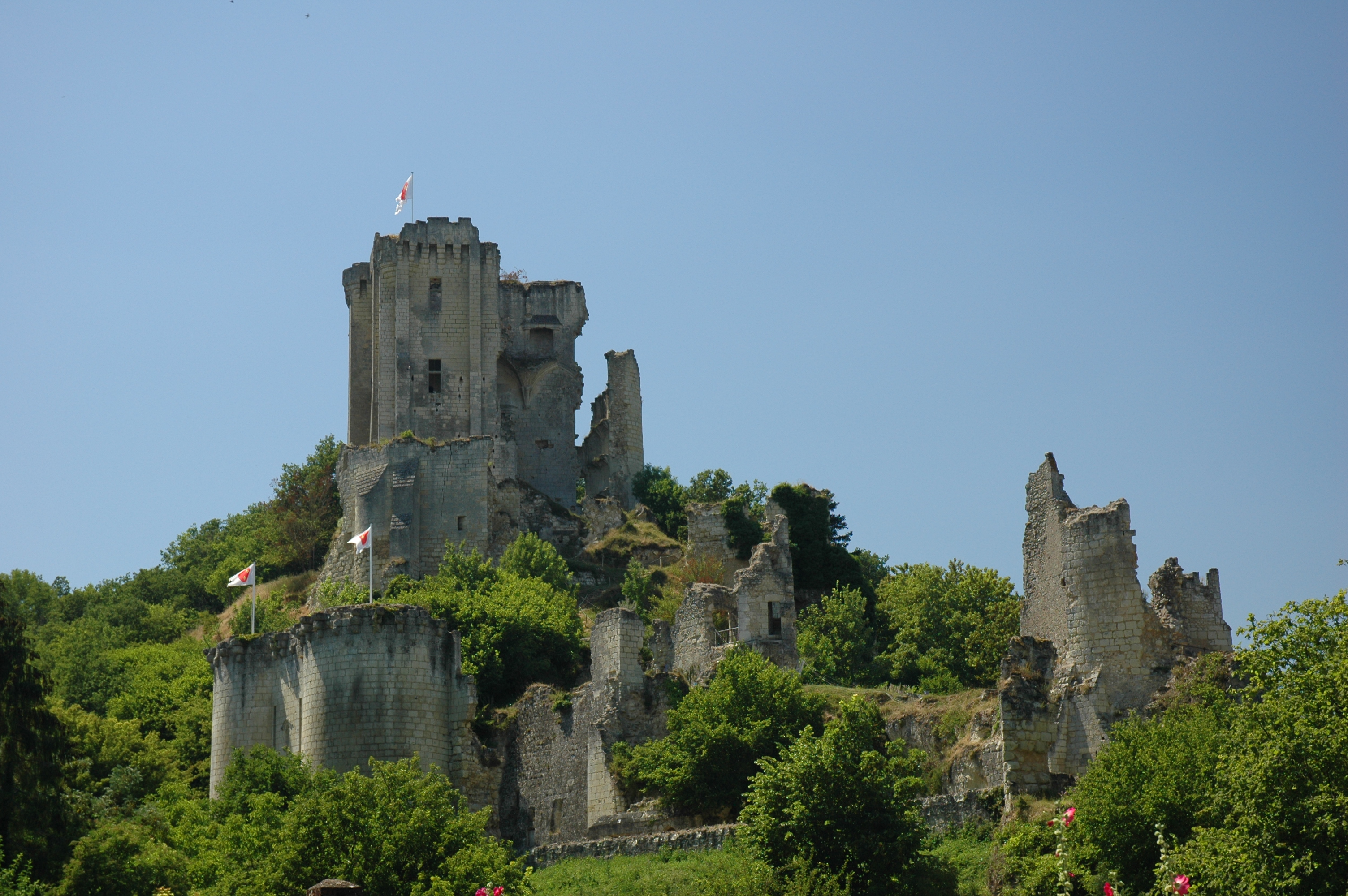 France Loir-et-Cher Lavardin Le château Photographie prise par GIRAUD Patrick